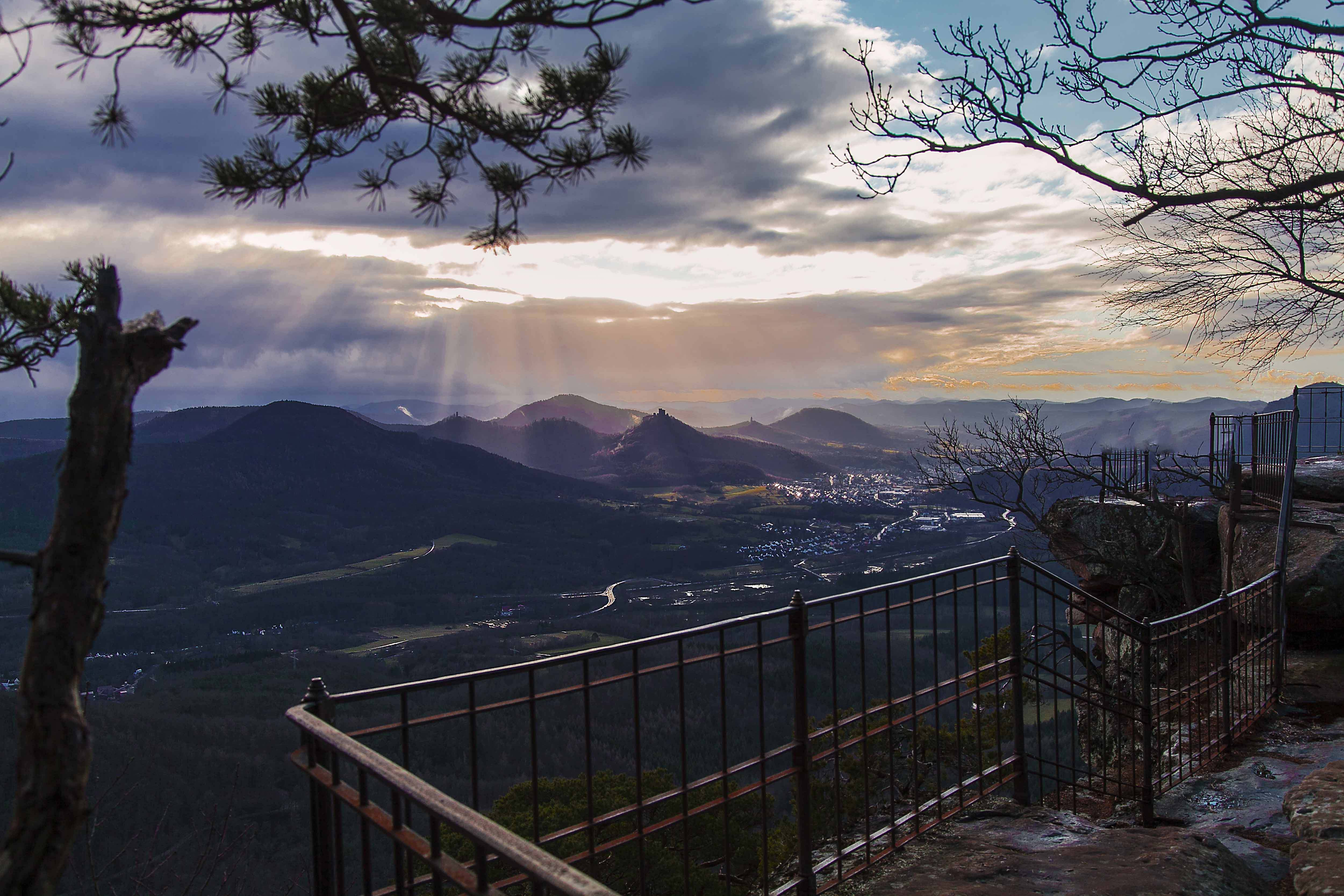 Ohrensfelsen - Blick ins Queichtal